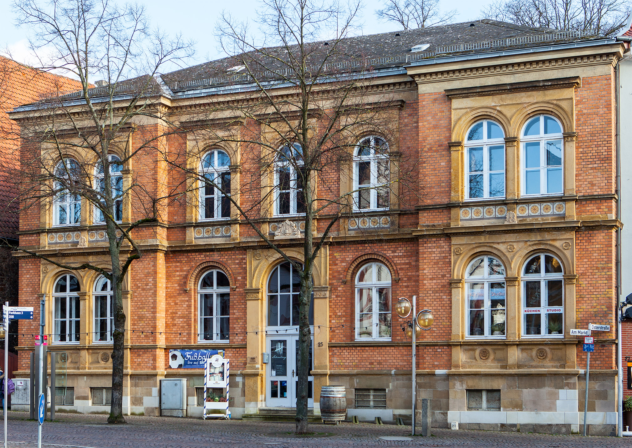 Bad Salzuflen, Am Markt 22, Ehemaliges Amtsgericht This is a photograph of an architectural monument.